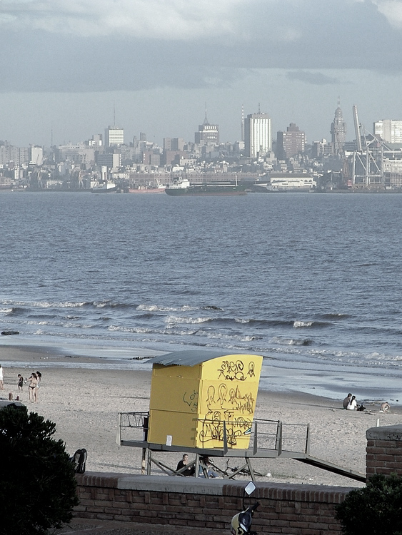 Playa del Cerro de Montevideo, Uruguay.